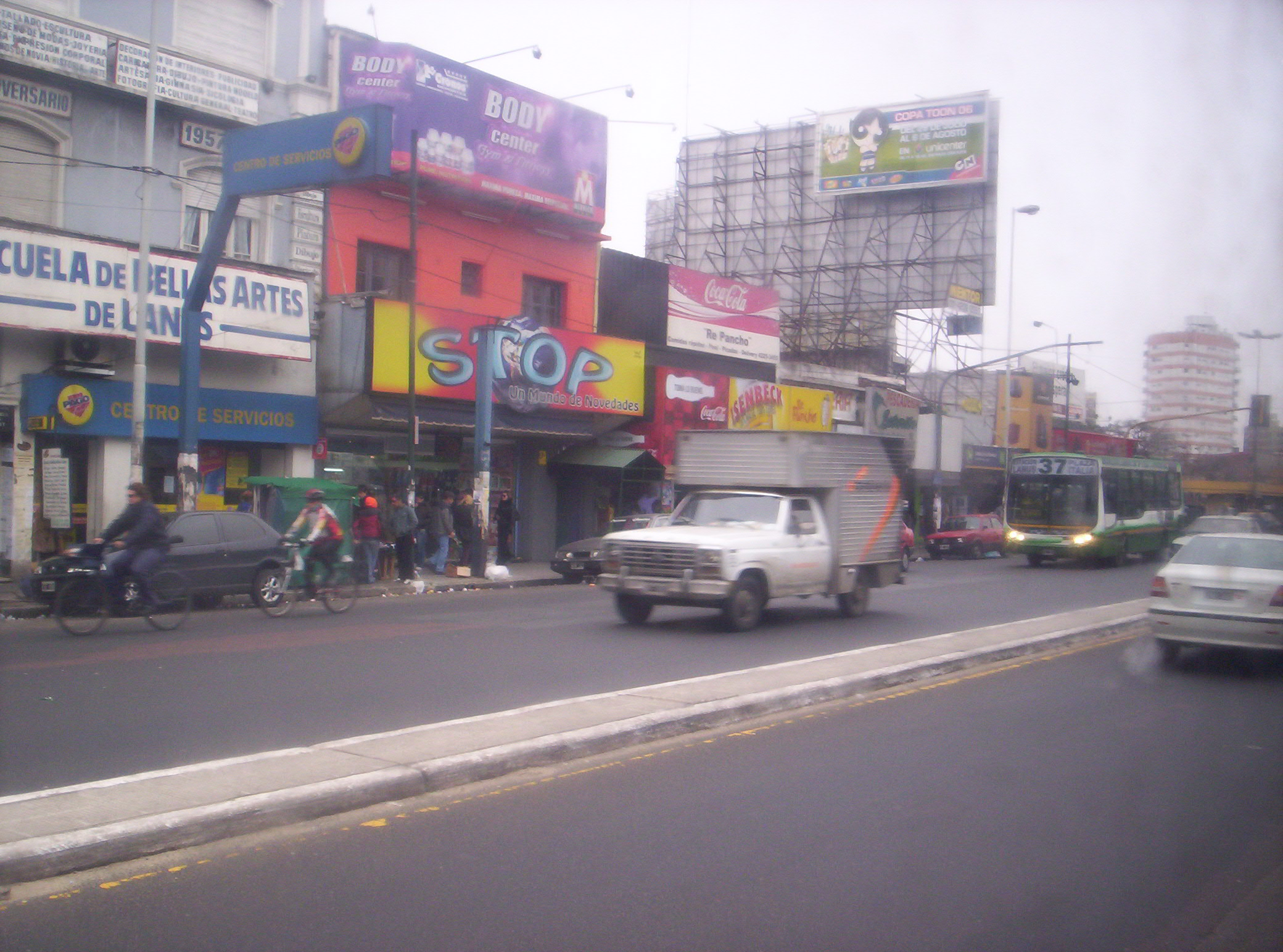 Avenida Hipólito Yrigoyen en su paso por el centro de la ciudad de Lanús.